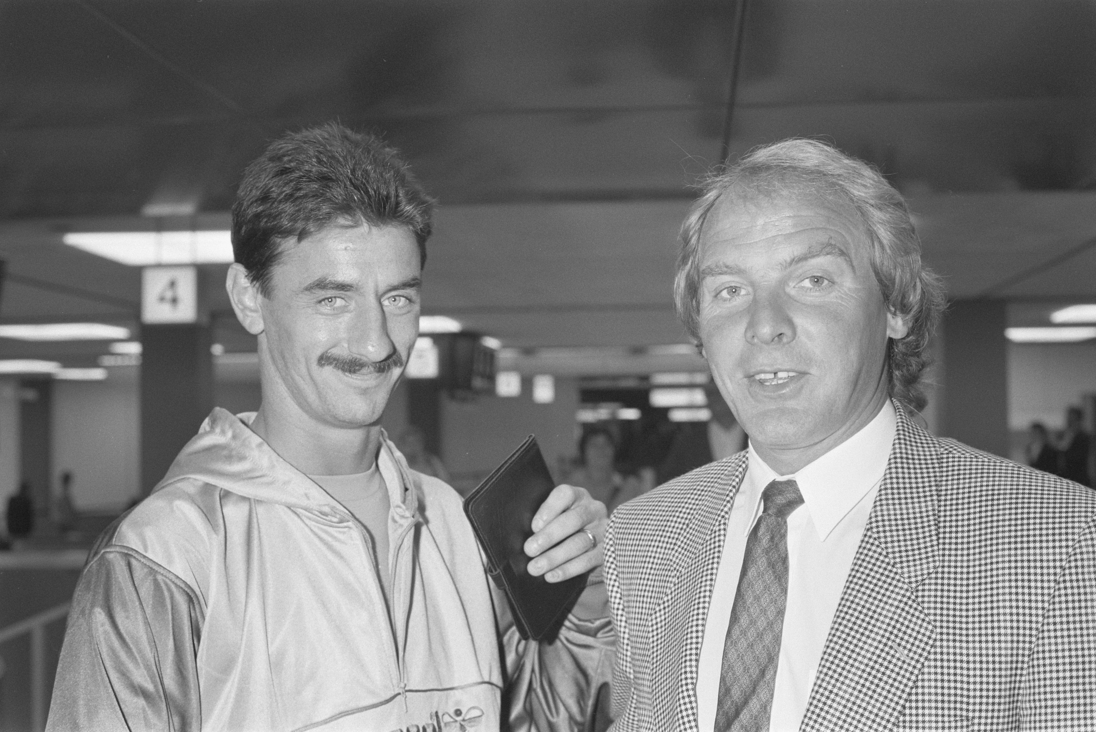 Aankomst elftal Wales; Ian Rush en bondscoach Terry Yorath.